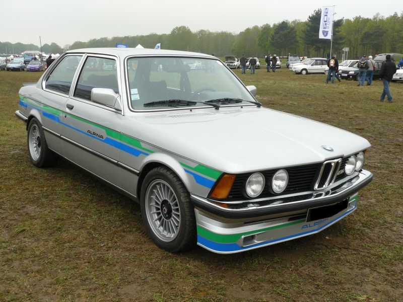 Français cadien: Montlhery Avril 2012